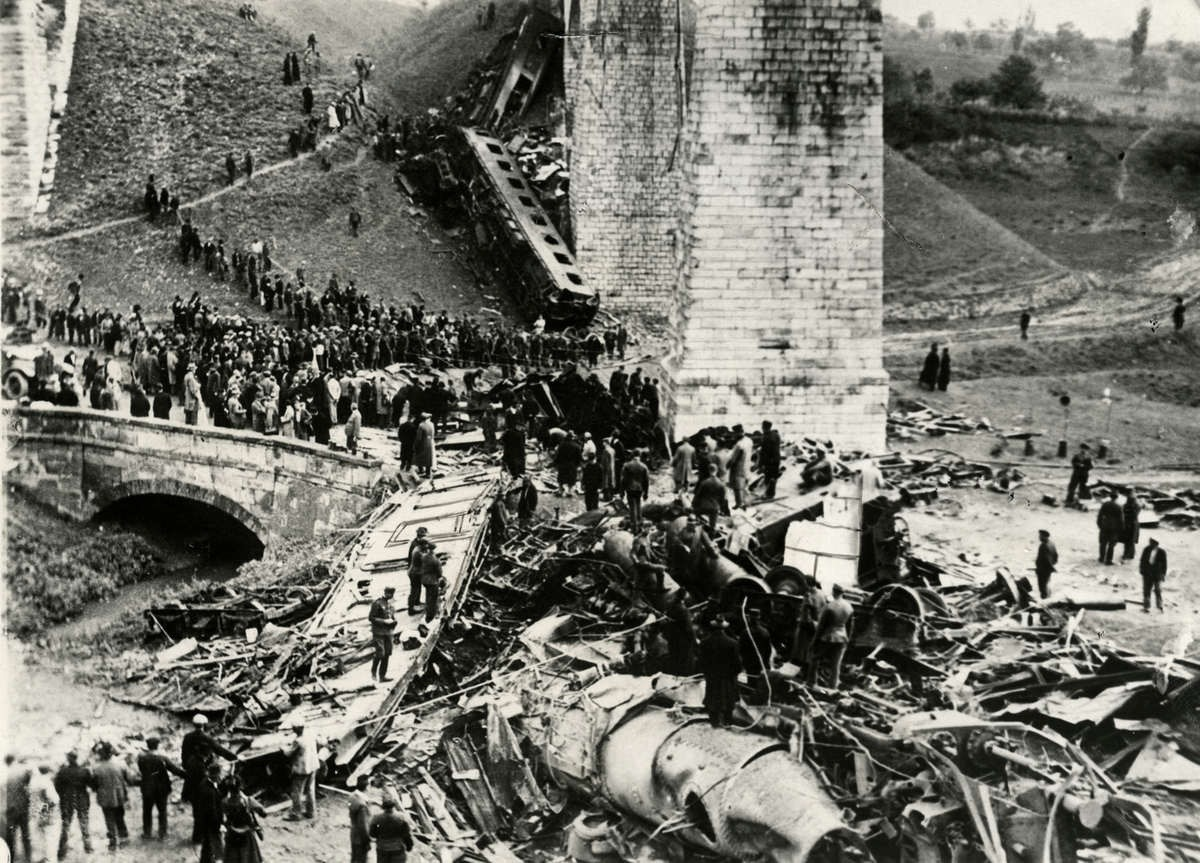 Spoorwegaanslagen. Bij een explosie in de D-trein tussen Budapest en Keulen stortte de trein vanaf een brug 50 meter de diepte in. 22 mensen stierven en 14 waren zwaar gewond. Het nieuwsgierige publiek komt kijken bij het onderzoek. Overal schroot en kapotte wagons. Biatobagy, Hongarije, september 1931.